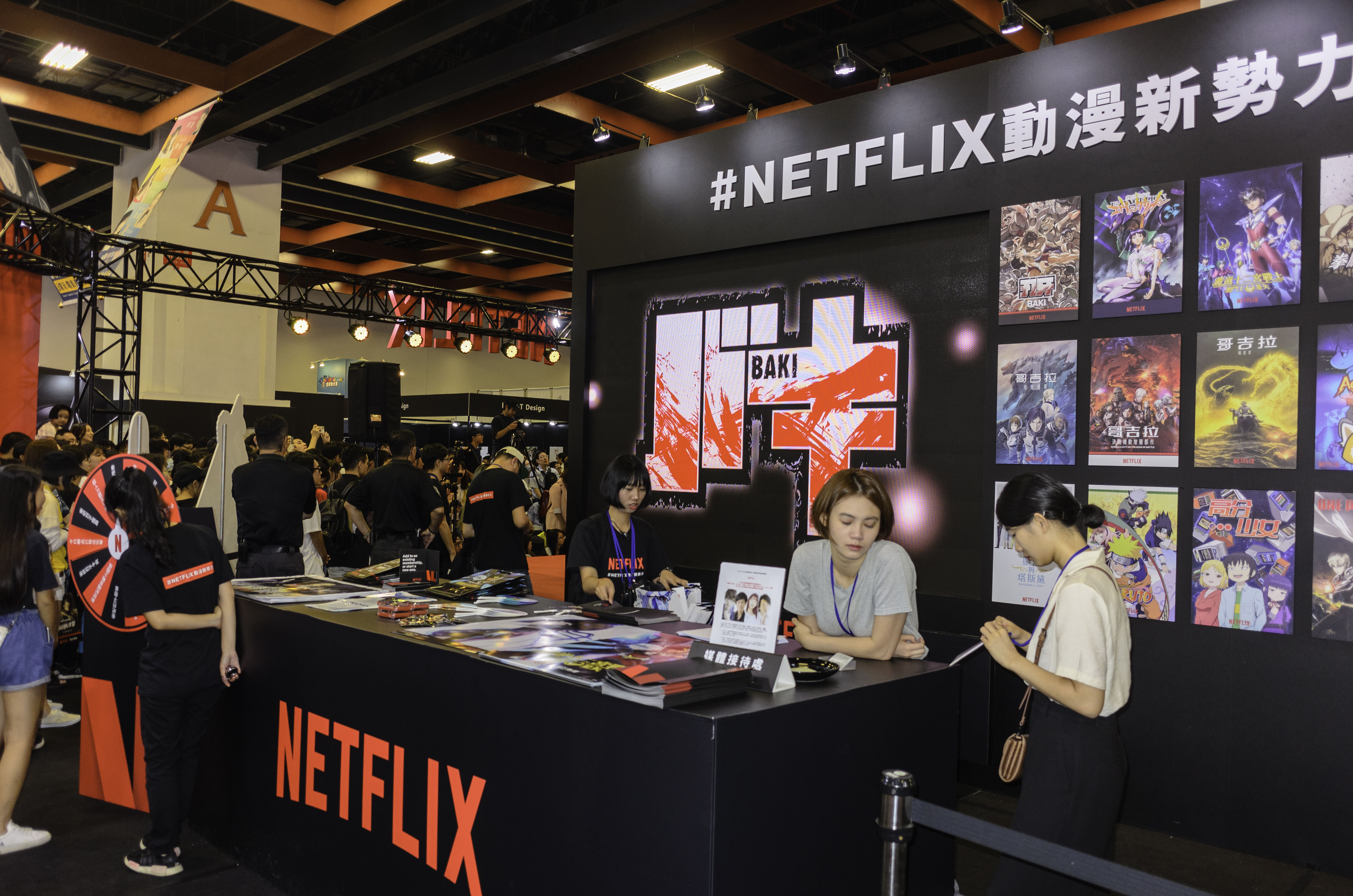 Stand Netflix